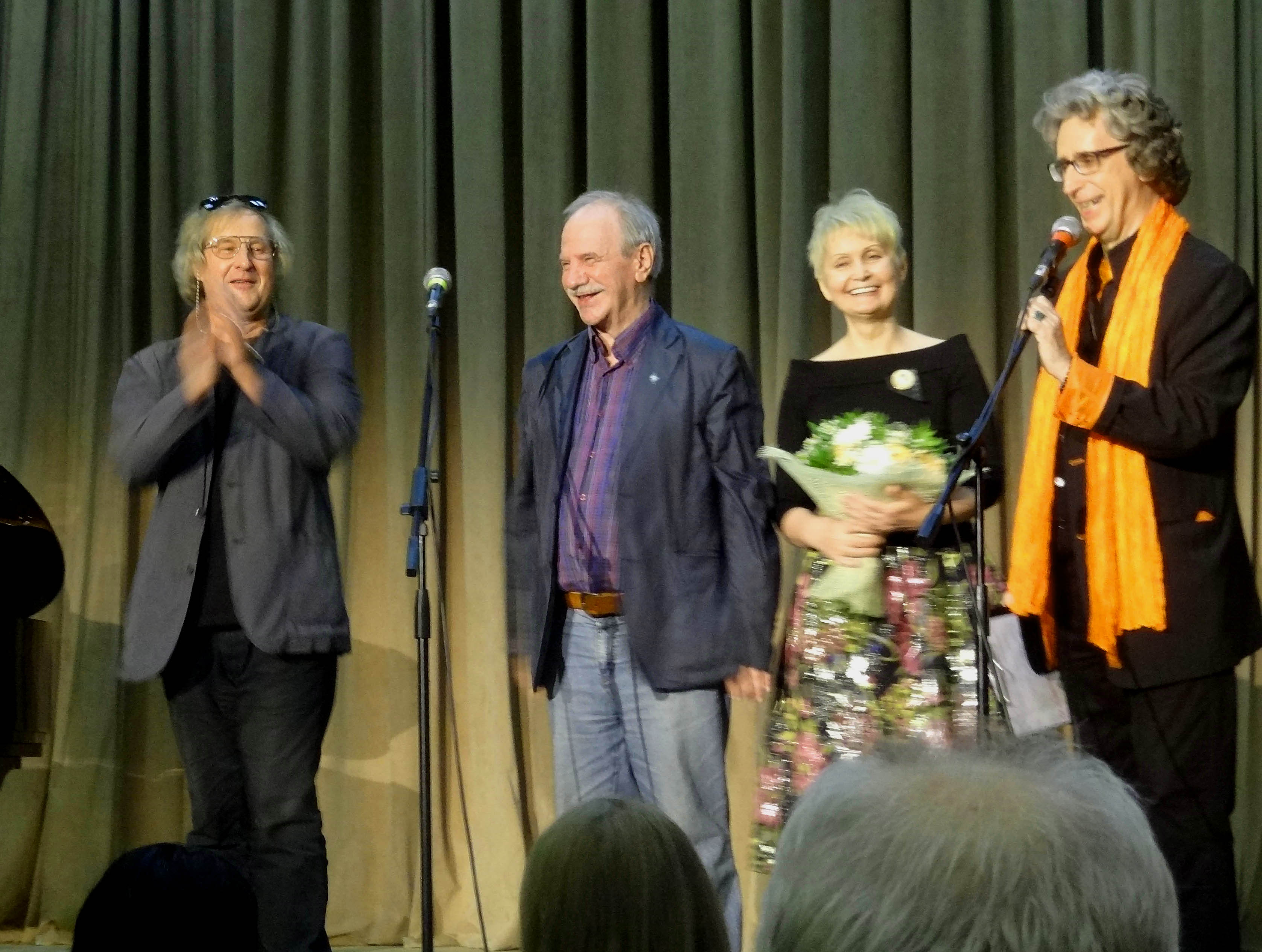 Открытие II Евразийского литературного фестиваля фестивалей "ЛиФФт-2017". На фото: режиссёр Андрей Житинкин, Золотой лауреат фестиваля "ЛиФФт-2016", поэт и философ Константин Кедров-Челищев, Генеральный директор проекта «ЛиФФт» Маргарита Альмухаметова (Маргарита Аль) и народный артист Республики Татарстан Эдуард Трескин.